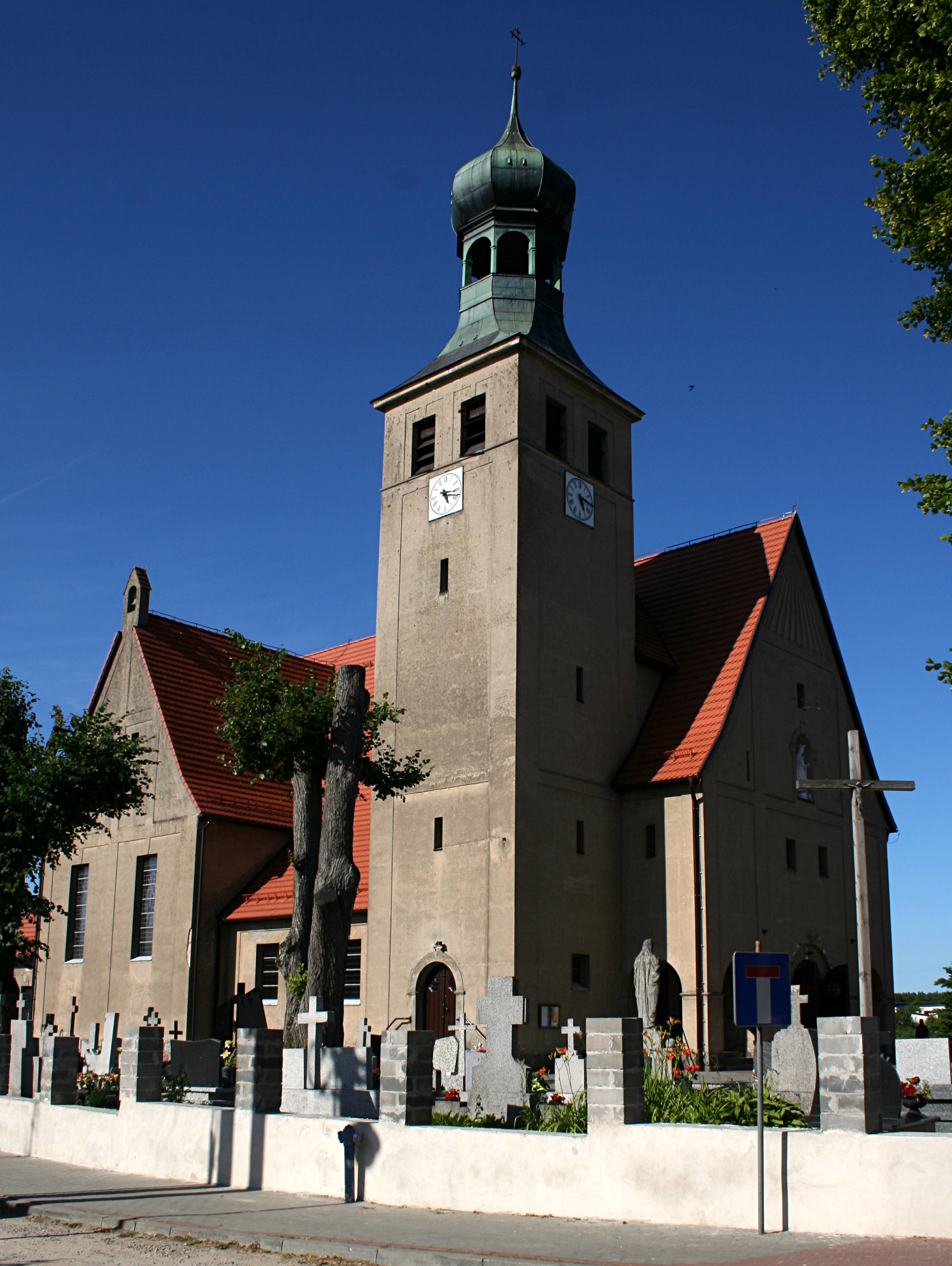 Kościół św. Barbary w Swornychgaciach